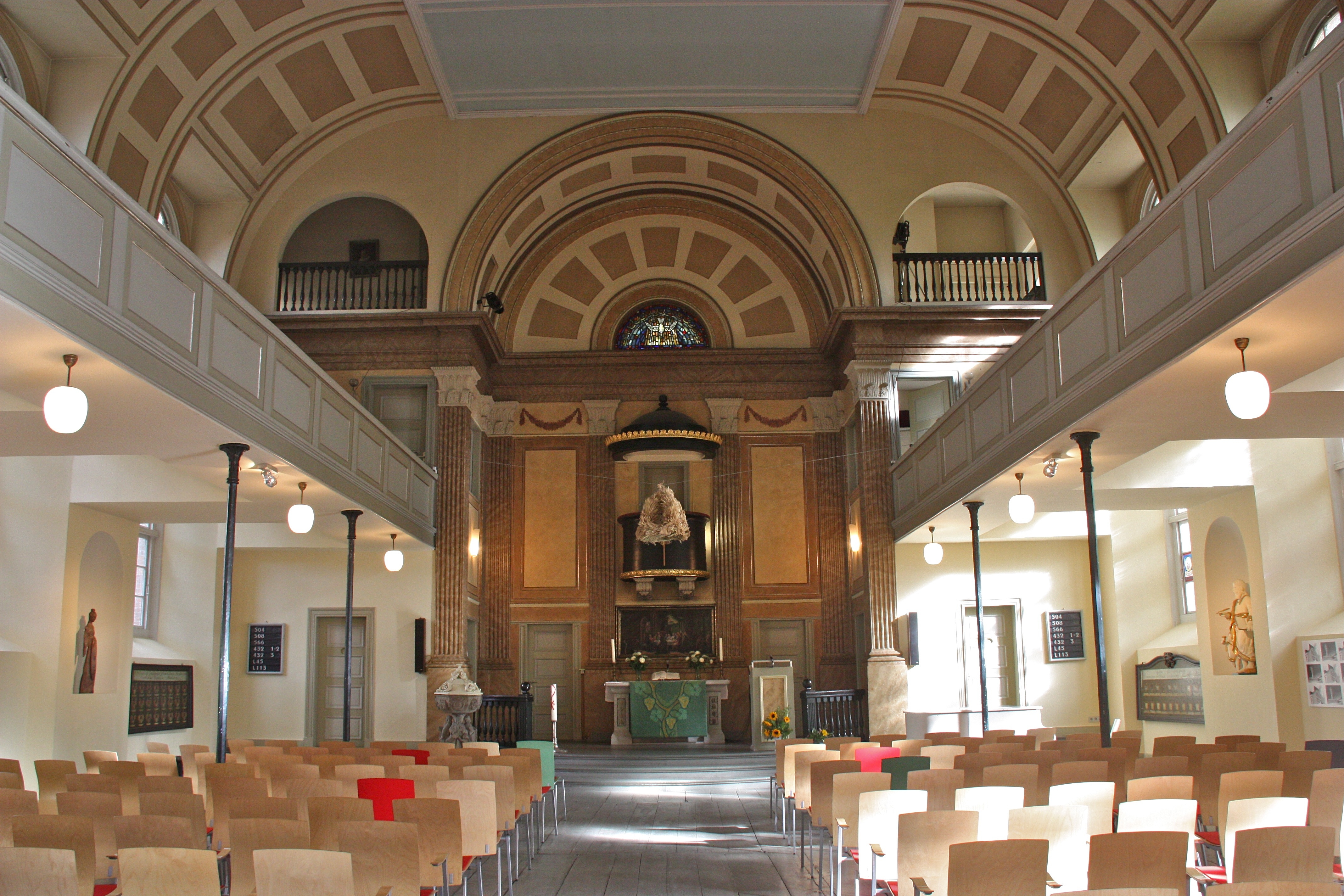 Hamburg, Kirche St. Pauli, Altona-Altstadt, Innenraum, Blick zum Altar